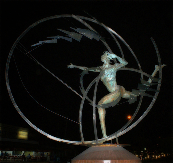 Foto de noche de la obra Carro de Sol de la escultora Miriam Pérez, La obra se encuentra en Paseo Cuauhnáhuac en Cuernavaca. Donde empieza Jiutepec.